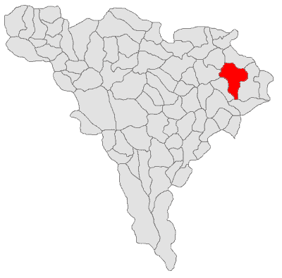 Categorie:Hărţi ale judeţului Alba